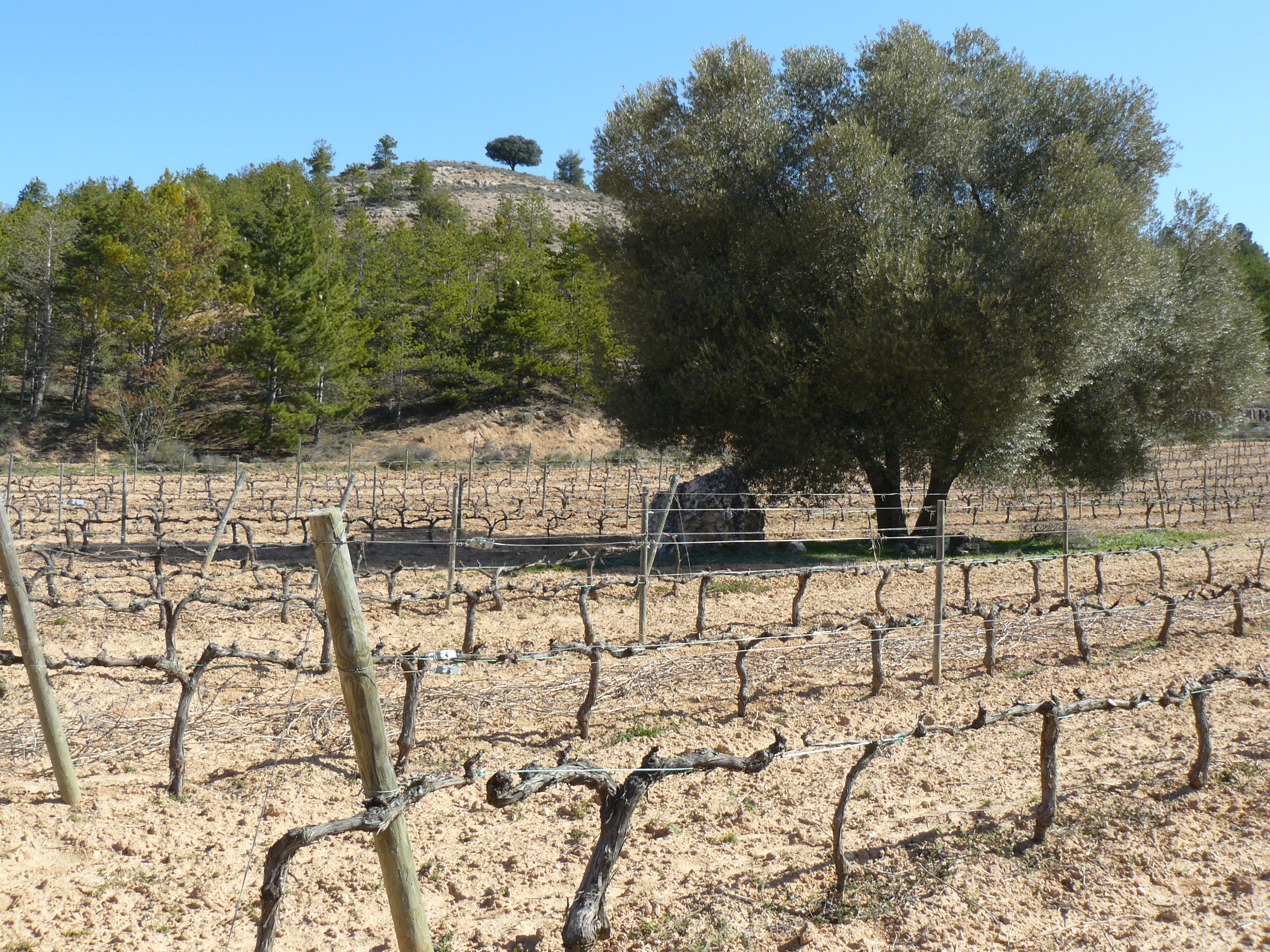 Gumiel del Mercado, Burgos.